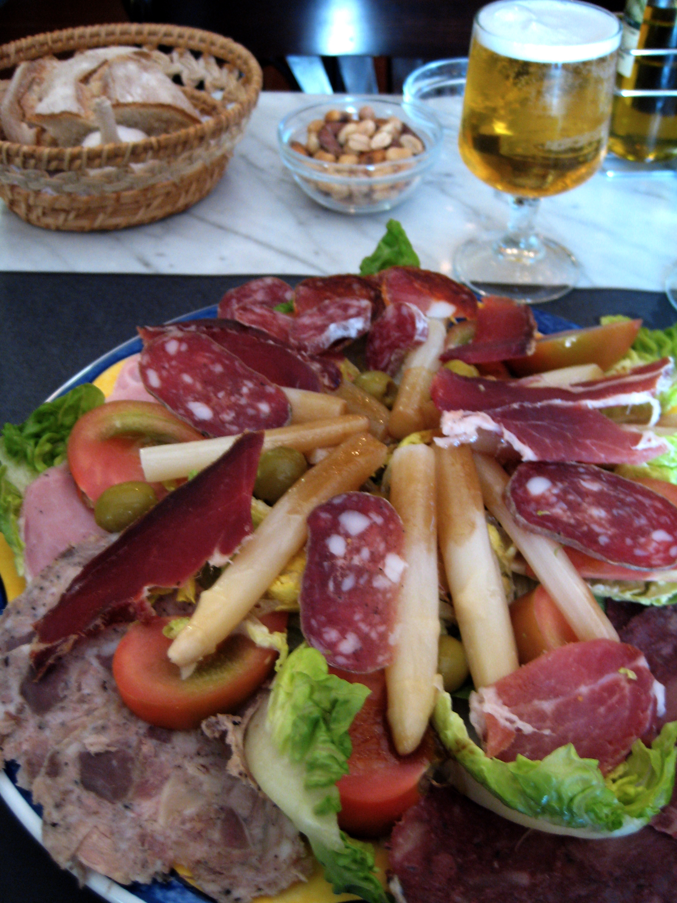 Amanida Catalana